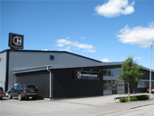 Hydroscand Örebro